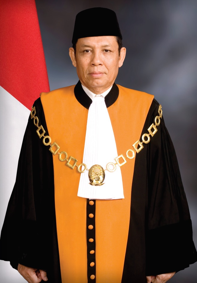 Hakim Agung Mahkamah Agung RI